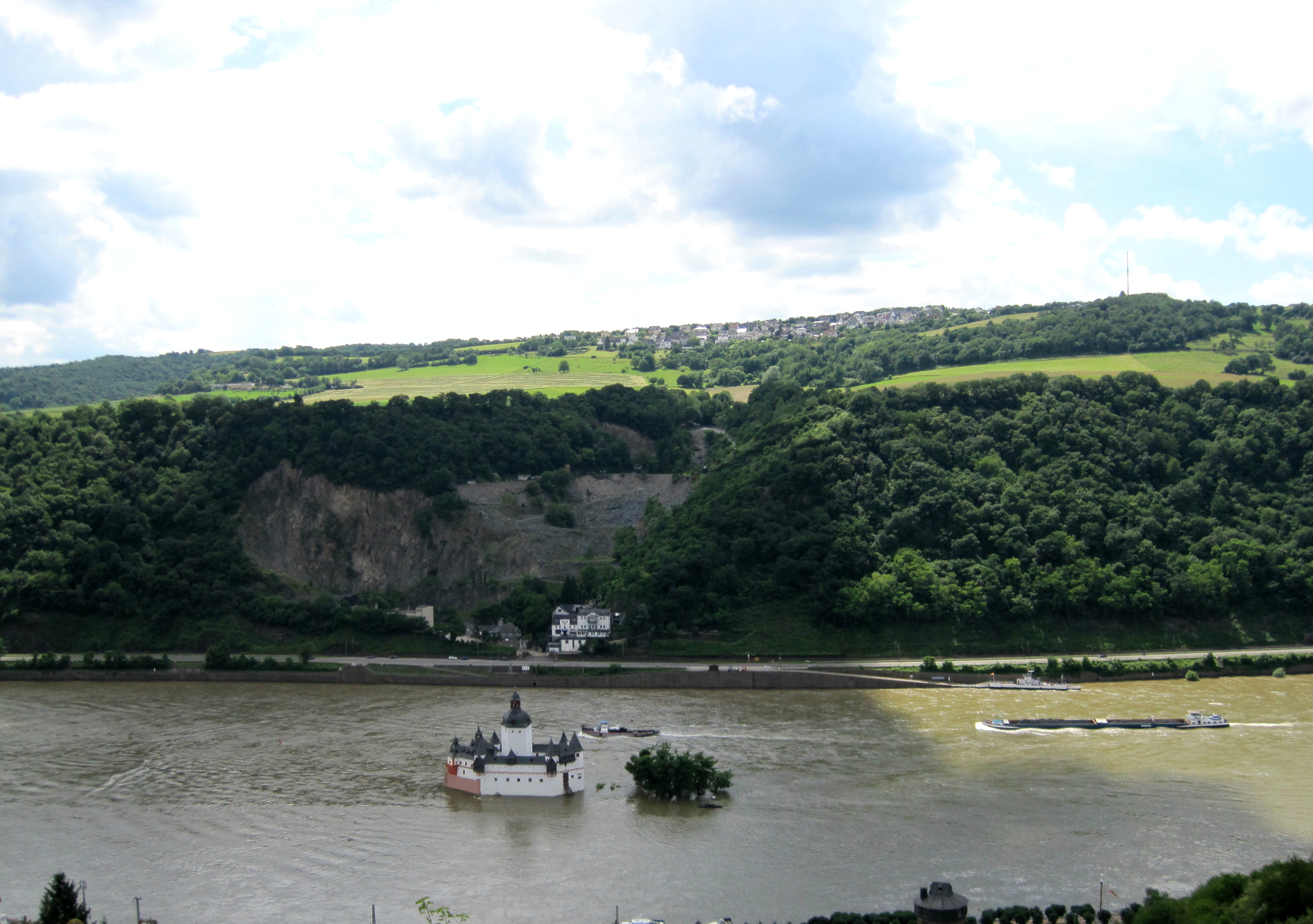 Henschhausen (Bacharach) mit der darunter liegenden Grube Rhein. Im Vordergrund Burg Pfalzgrafenstein.